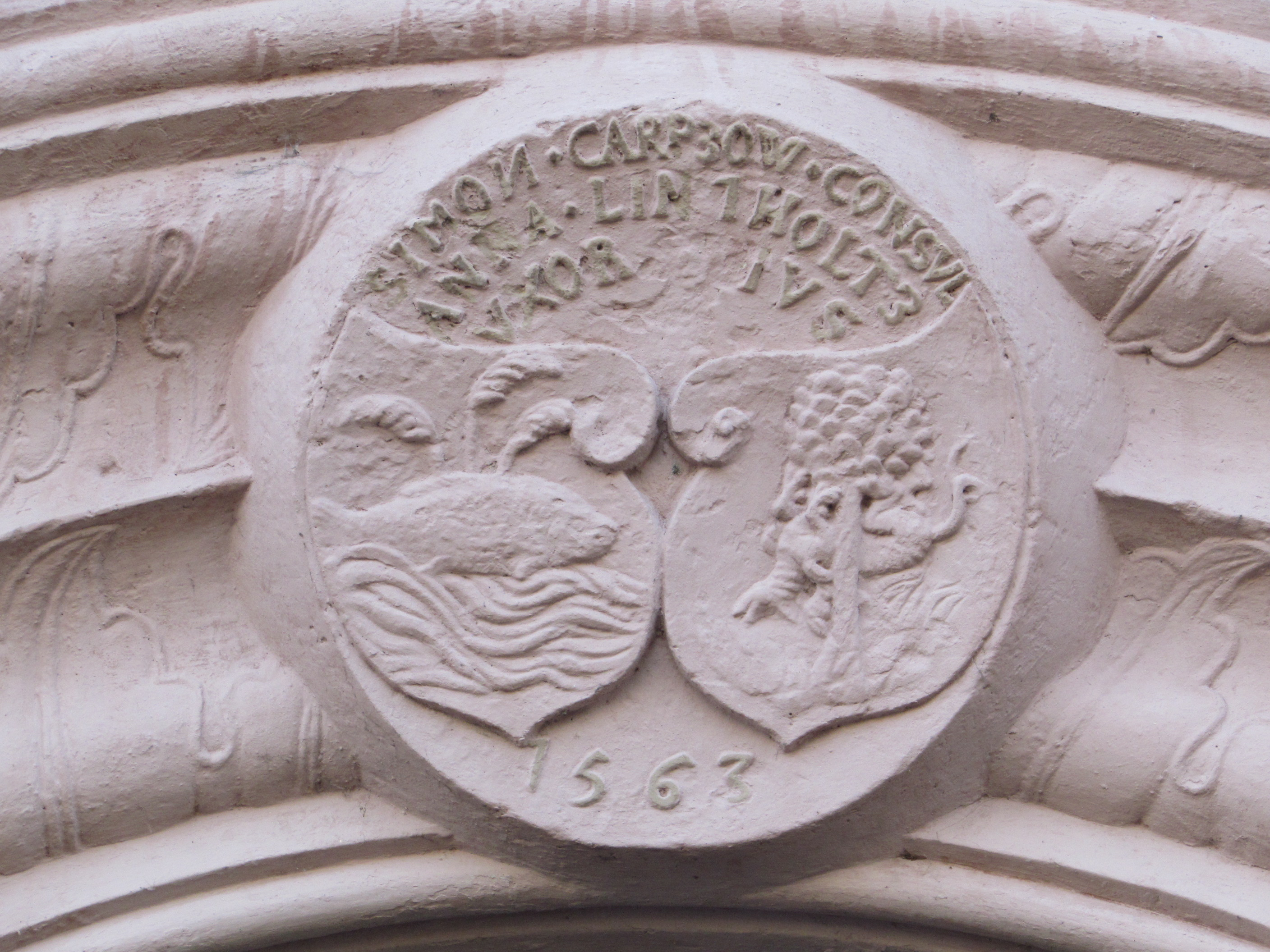 Wappen der Familien Carpzow und Lintholtz im Portal der Saldria, Gotthardtkirchplatz 9, Brandenburg an der Havel